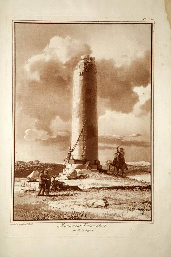 Rappresentazione della Colonna Pizzuta di Eloro (SR) di Jean Houel del 1785